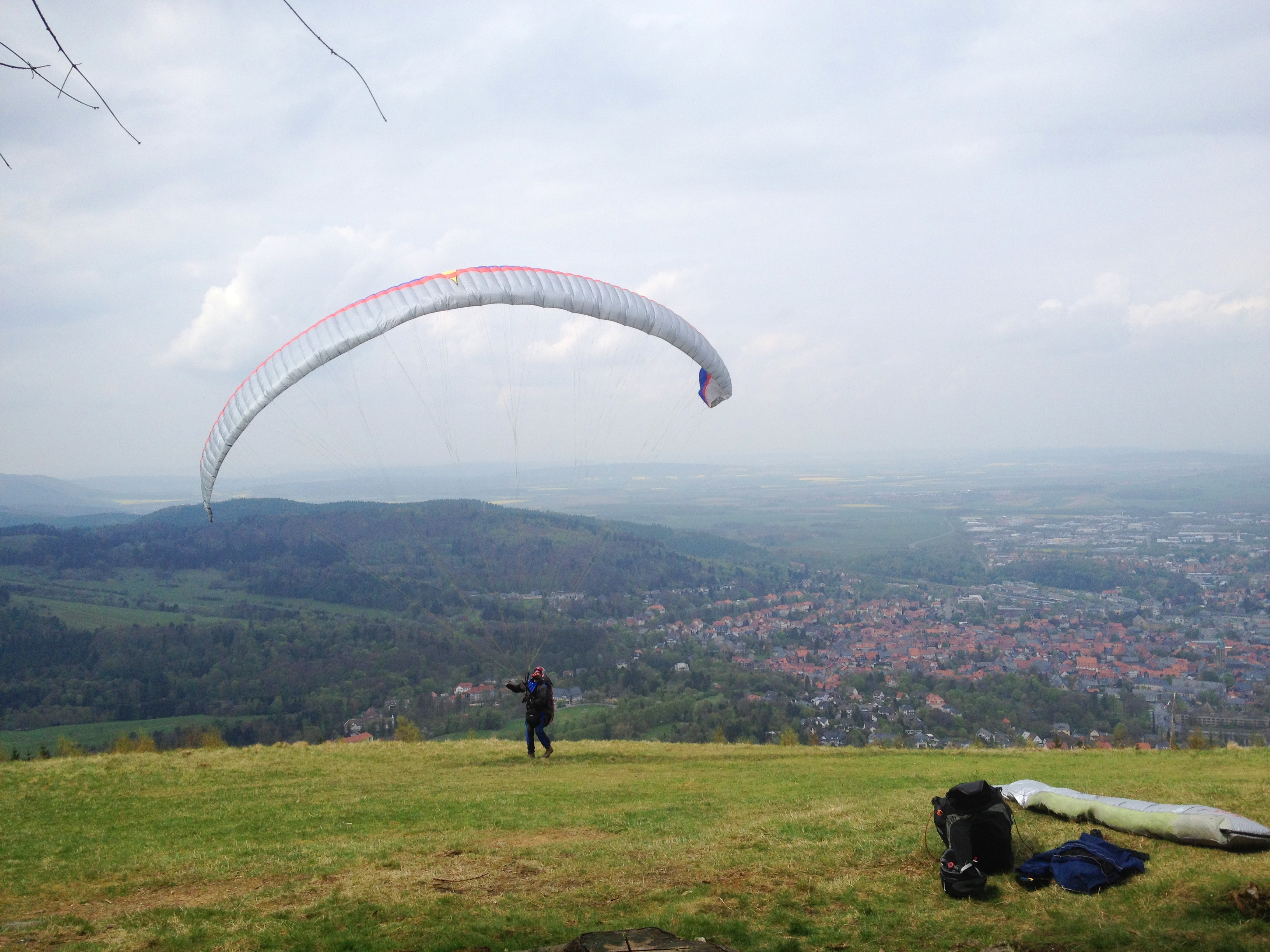 Goslar, Rammelsberg, Gleitschirm-Start